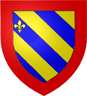 Armes de Philippe Monsieur de Bourgogne, comte consort d'Auvergne Auteur : Cornelissur la base de 50 px